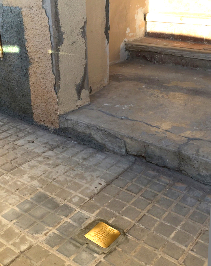 Stolperstein in El Pala de Torroella